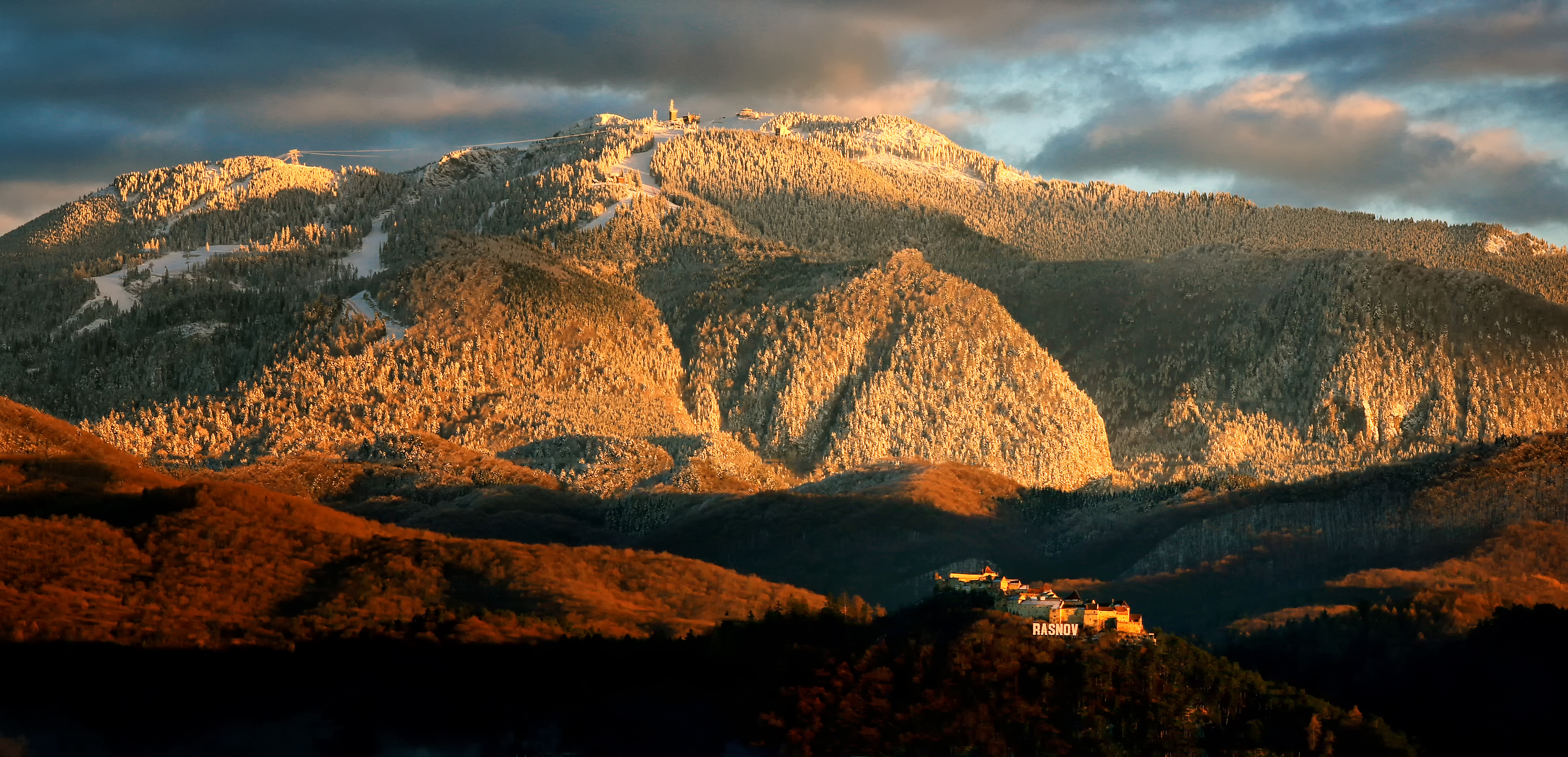 Cetatea Râșnovului